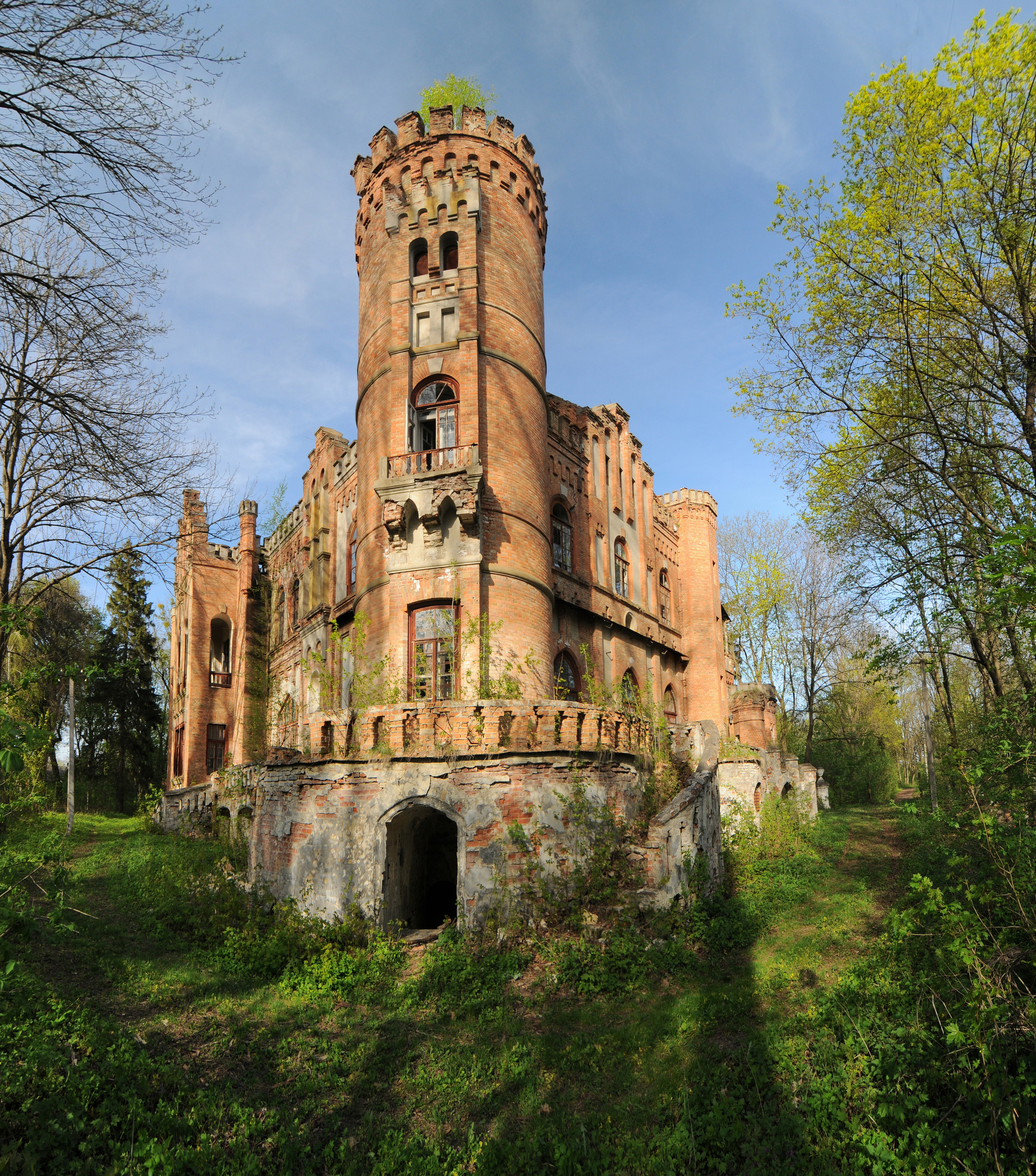 Леськове, садиба Даховських, "замок"-палац